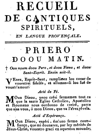 Premiera pagina de la partida en lenga d'oc dei cantics pulicats per Monsenhor Champion de Cicé